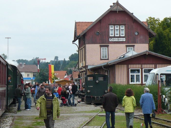 Öchsle-Bahnhof Ochsenhausen, Deutschland